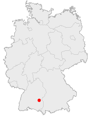 jen "historia" esperanto-vikipedia situobildo de la urbo Ehingen en Germanio, el majo 2006, kiam tiaj mapoj ankoraŭ fariĝis unuope {